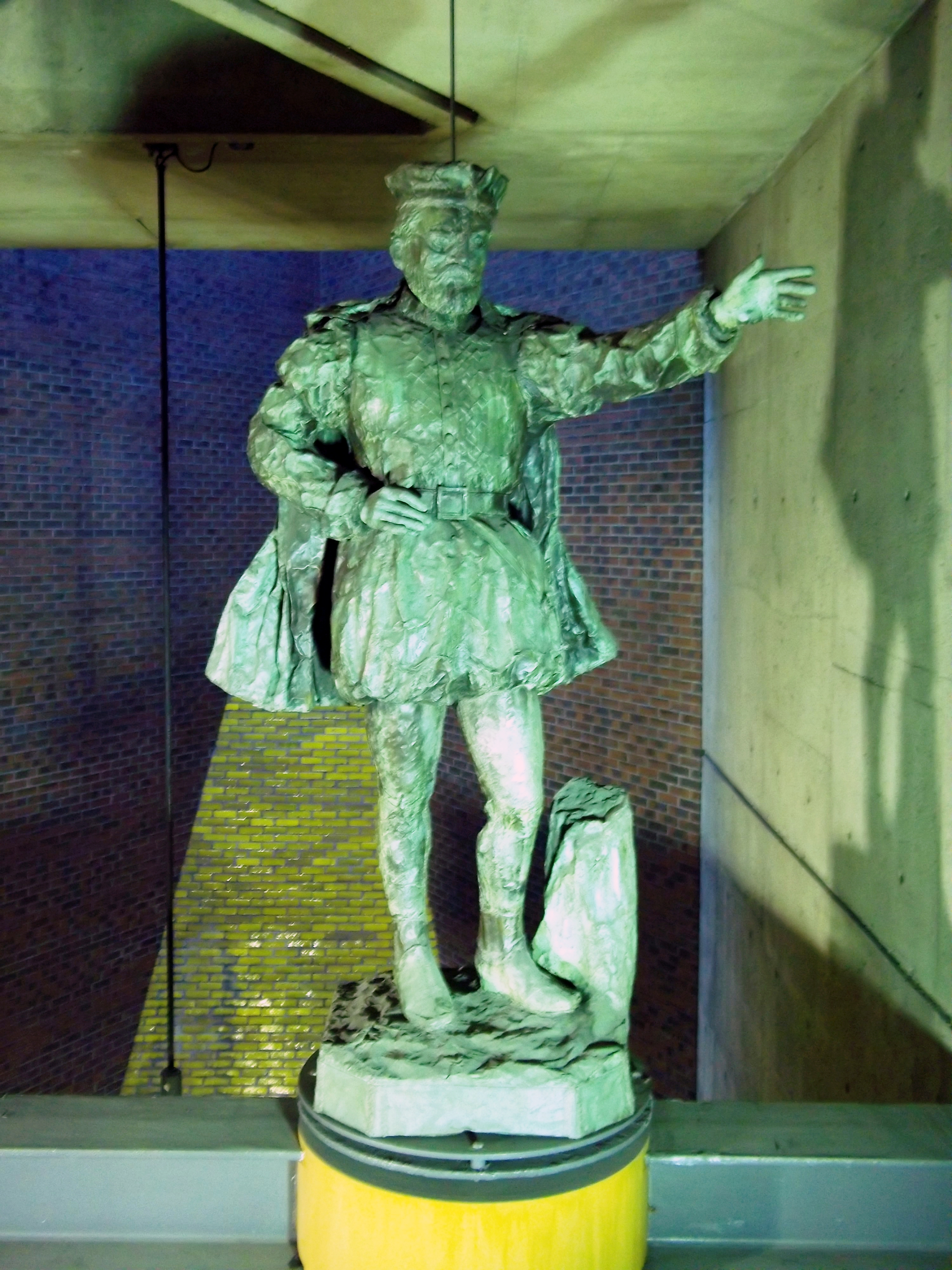 Statue de Jacques Cartier à la station de métro Place-Saint-Henri à Montréal. Il s'agit de l'œuvre originale (1893) du sculpteur Joseph-Arthur Vincent, faite de bois couvert de cuivre, qui faisait autrefois partie du monument-fontaine en hommage à Jacques Cartier au Parc Saint-Henri ( la sculpture y a été remplacée par une copie résistante aux intempéries).